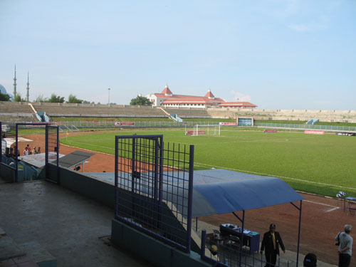 Bldfef